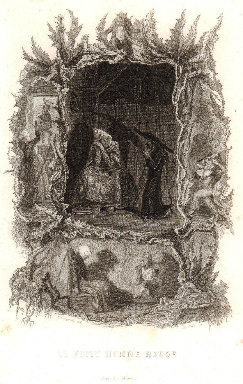 Gravure illustrant Le petit homme rouge, l'un des poèmes de Béranger publiés par Perrotin.